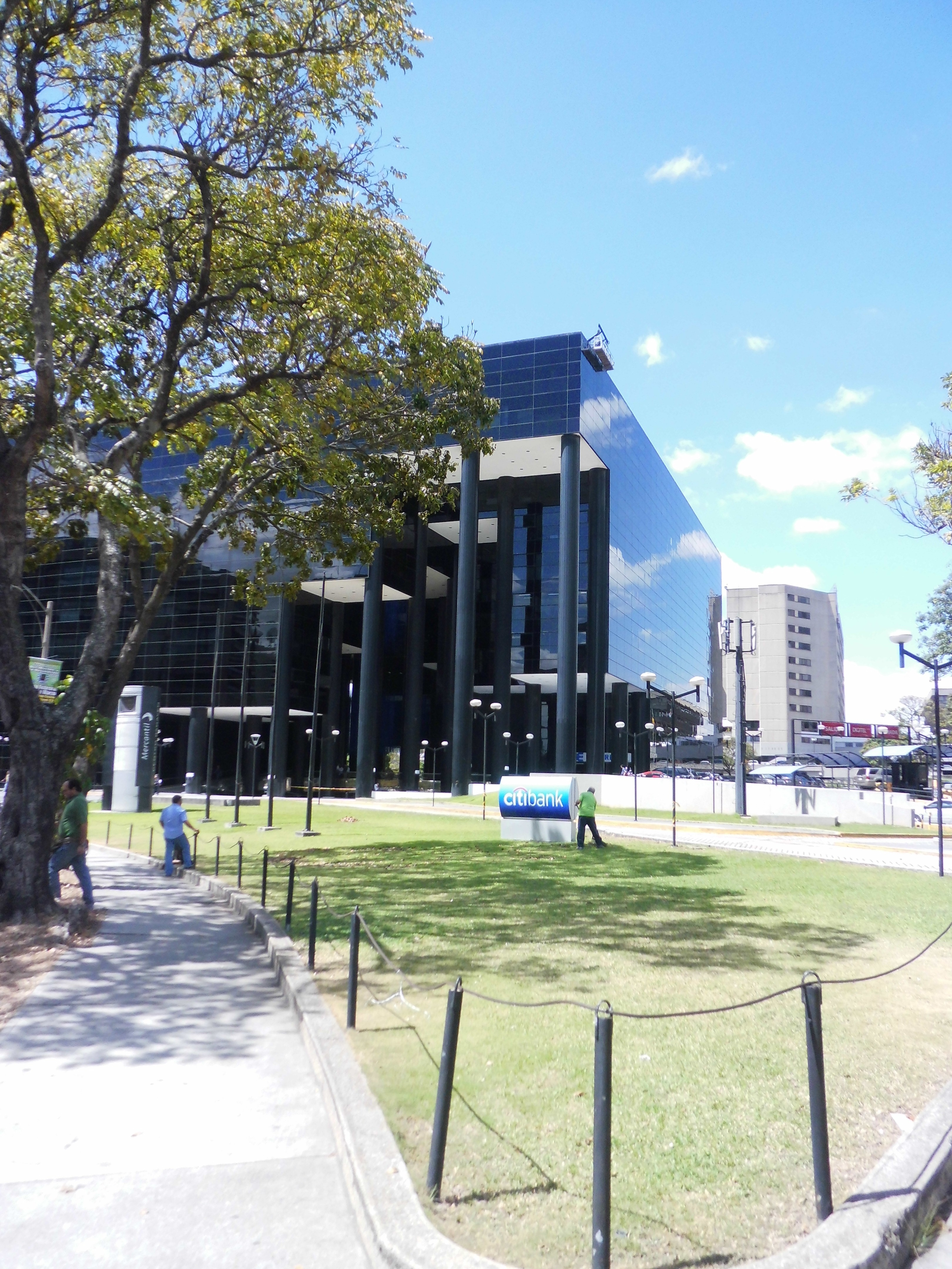 Cubo Negro, municipio Chacao, estado Miranda - Venezuela